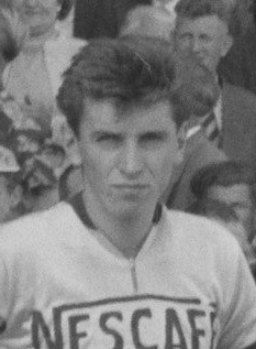 Start Ronde van Nederland Stadion Utrecht . Zwitserse ploeg (Nescafe) kopman Hugo Koblet